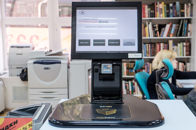 Государственное бюджетное учреждение культуры г. Москвы «Центральная универсальная научная библиотека имени Н.А. Некрасова» Главное здание Библиотеки им. Н.А. Некрасова 105005, Москва, ул. Бауманская, д. 58/25, стр. 14 (м. «Бауманская»)